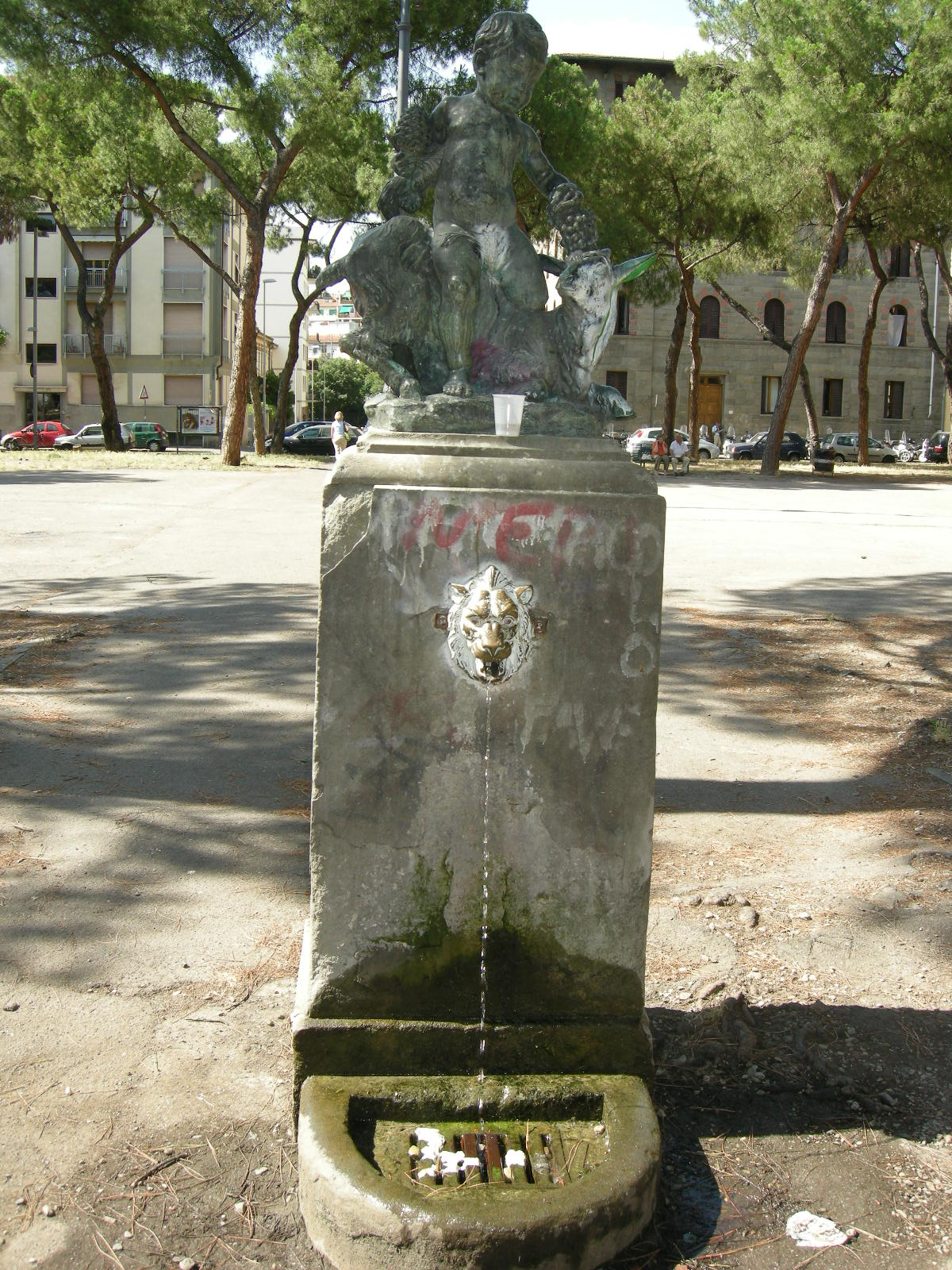 Piazza della vittoria, fontana